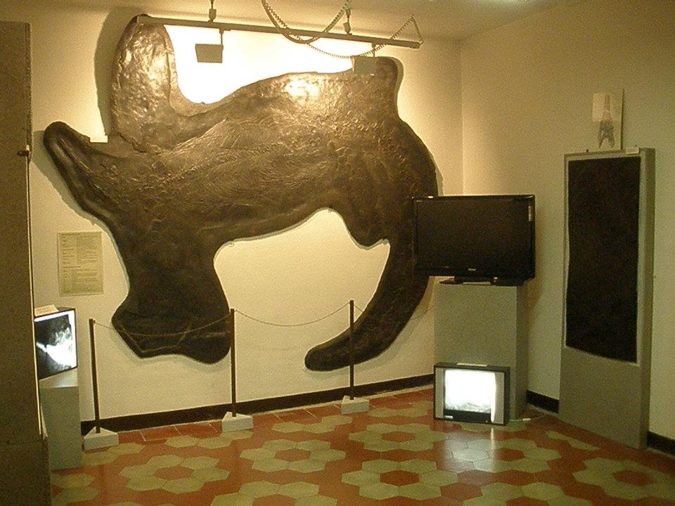 Museo Fossili Besano 3